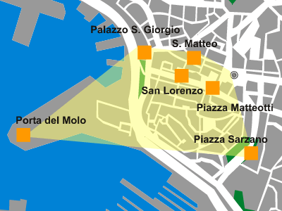 Mappa del sestiere del Molo - Genova